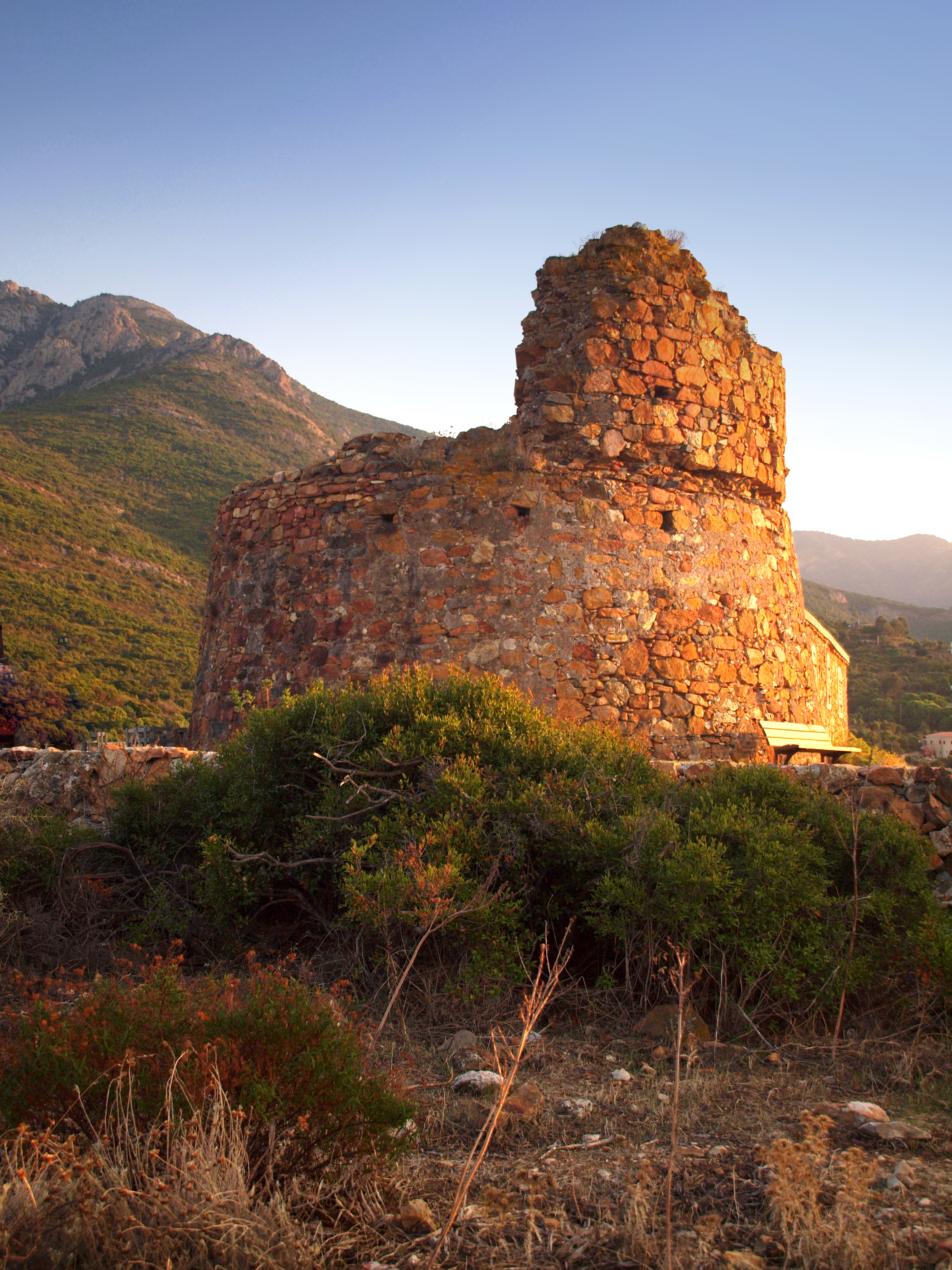 Galéria - Tour génoise de Galéria ruinée